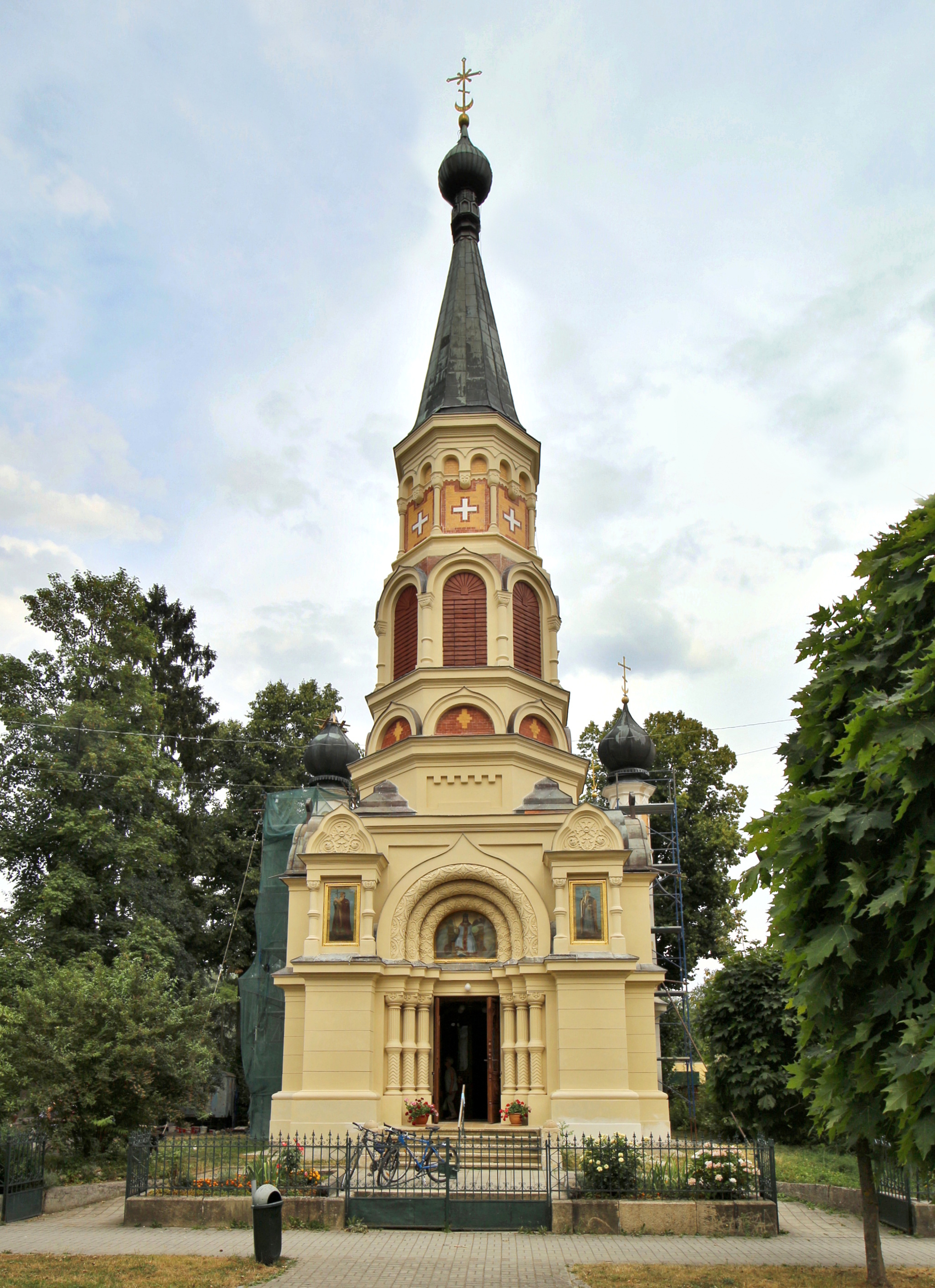 Chrám svaté kněžny Olgy ve Františkových Lázních